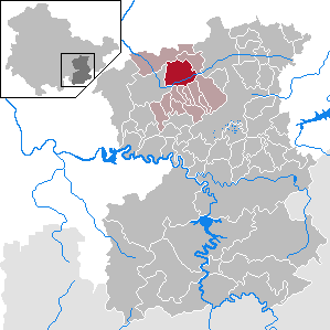 Oppurg in Thuringia - Saale-Orla-Kreis